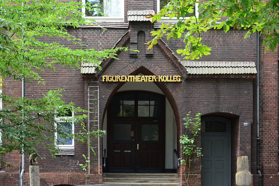 Foto vom Eingang des Figurentheater-Kollegs in Bochum-Langendreer.